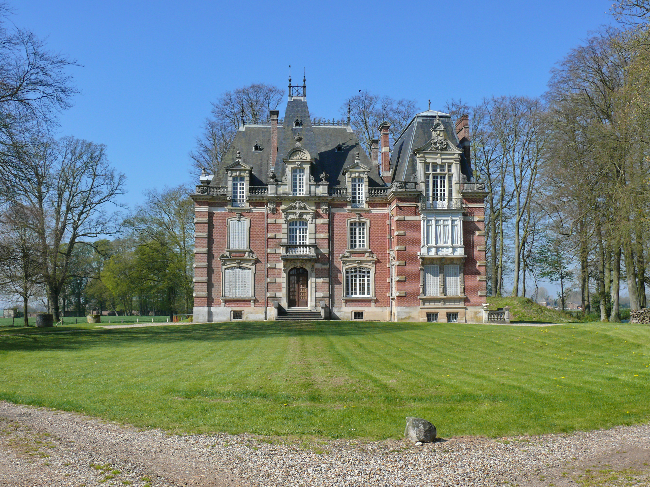 SARCUS : Le château(XIXe siècle) Il fut la résidence du général Foch (du 7 avril au 1er juin 1918)